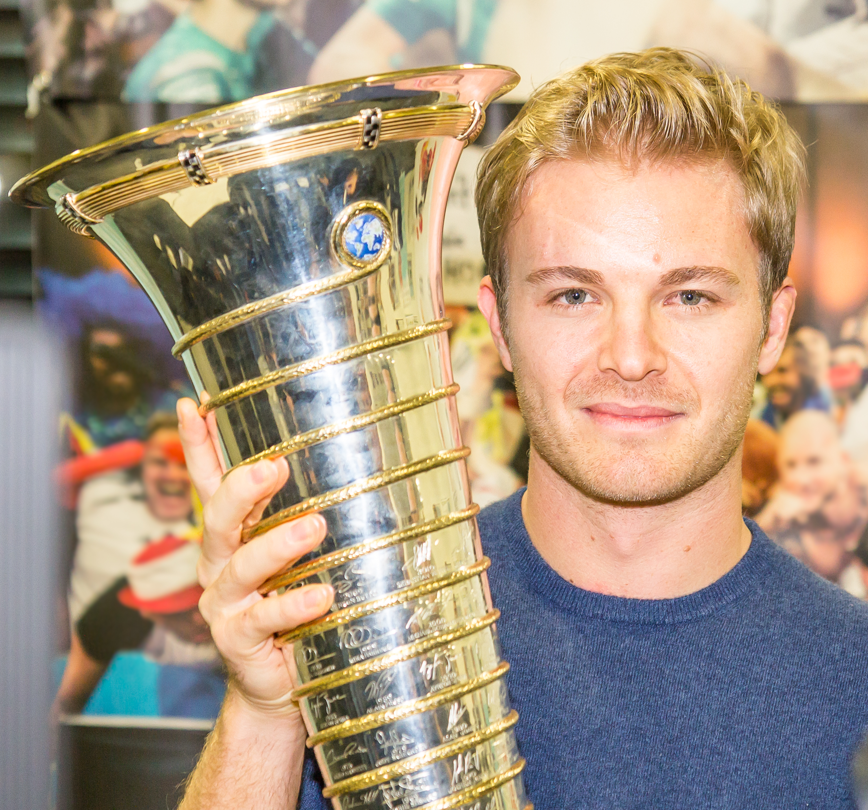 Pressetermin Lukas Podolski und Nico Rosberg, Airport Köln-Bonn